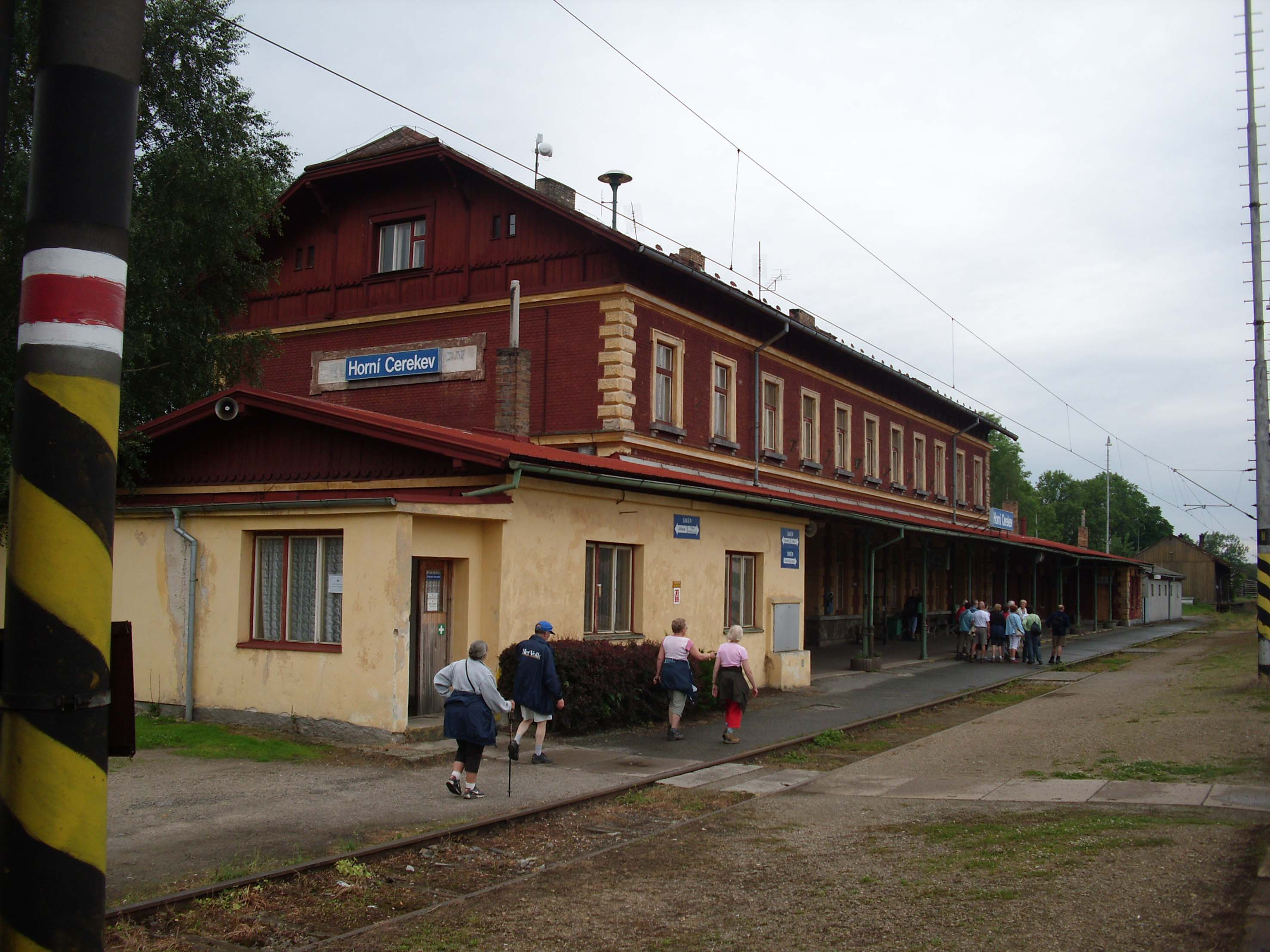 Železniční stanice Horní Cerekev